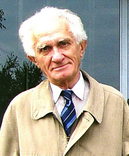 Академик Российской Академии Наук Владимир Михайлович Котляков